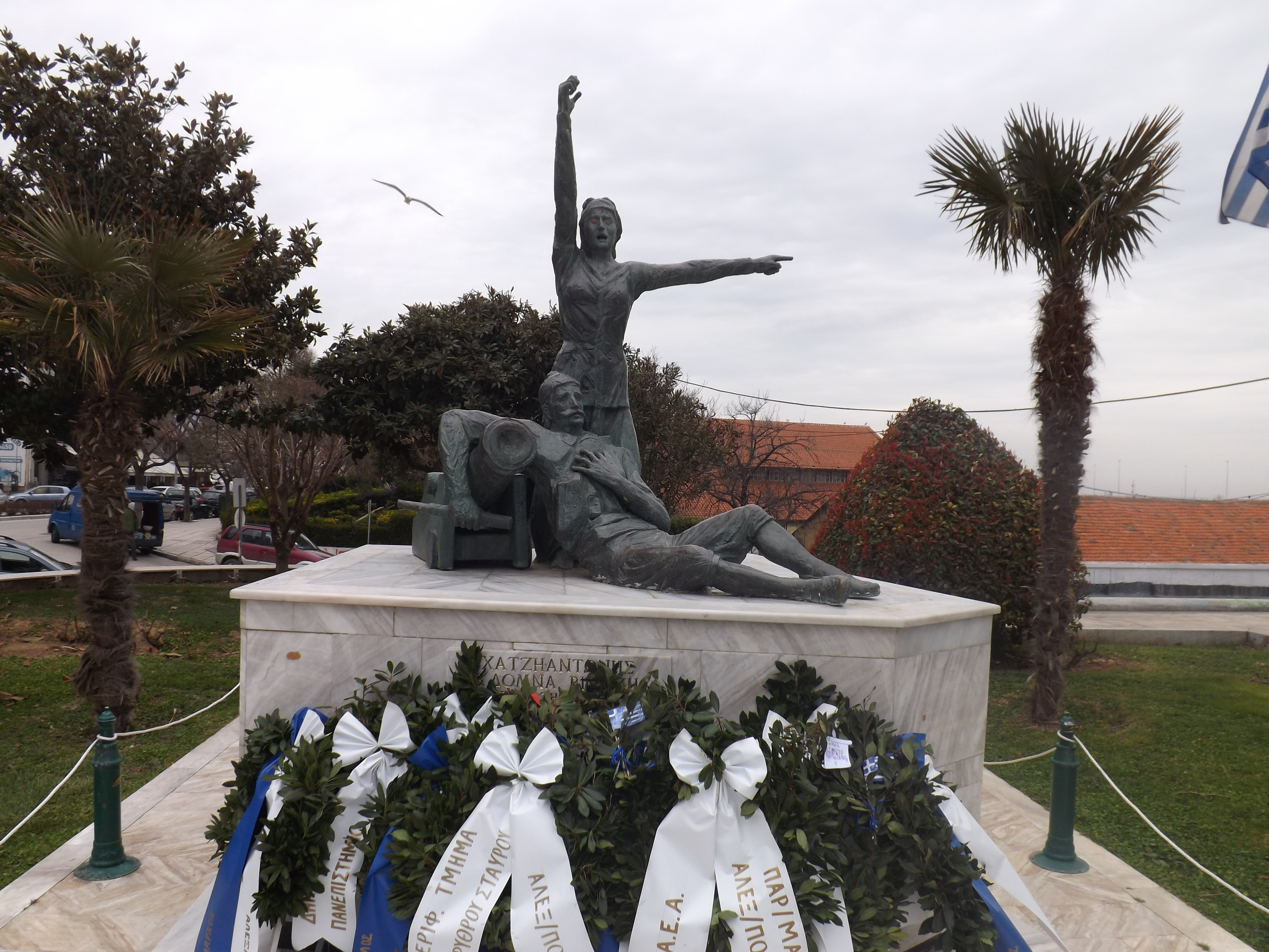 Μνημείο των Δόμνα και Χατζή Αντώνη Βισβίζη στην πλατεία Φάρου Αλεξανδρούπολης, που φιλοτεχνήθηκε από τον Γ. Μέγκουλα το 1987 δαπάνη του ΕΛΛΗΝΟΜΟΥΣΕΙΟΥ ΑΙΝΟΥ-Σύλλογος Αλεξανδρούπολης.